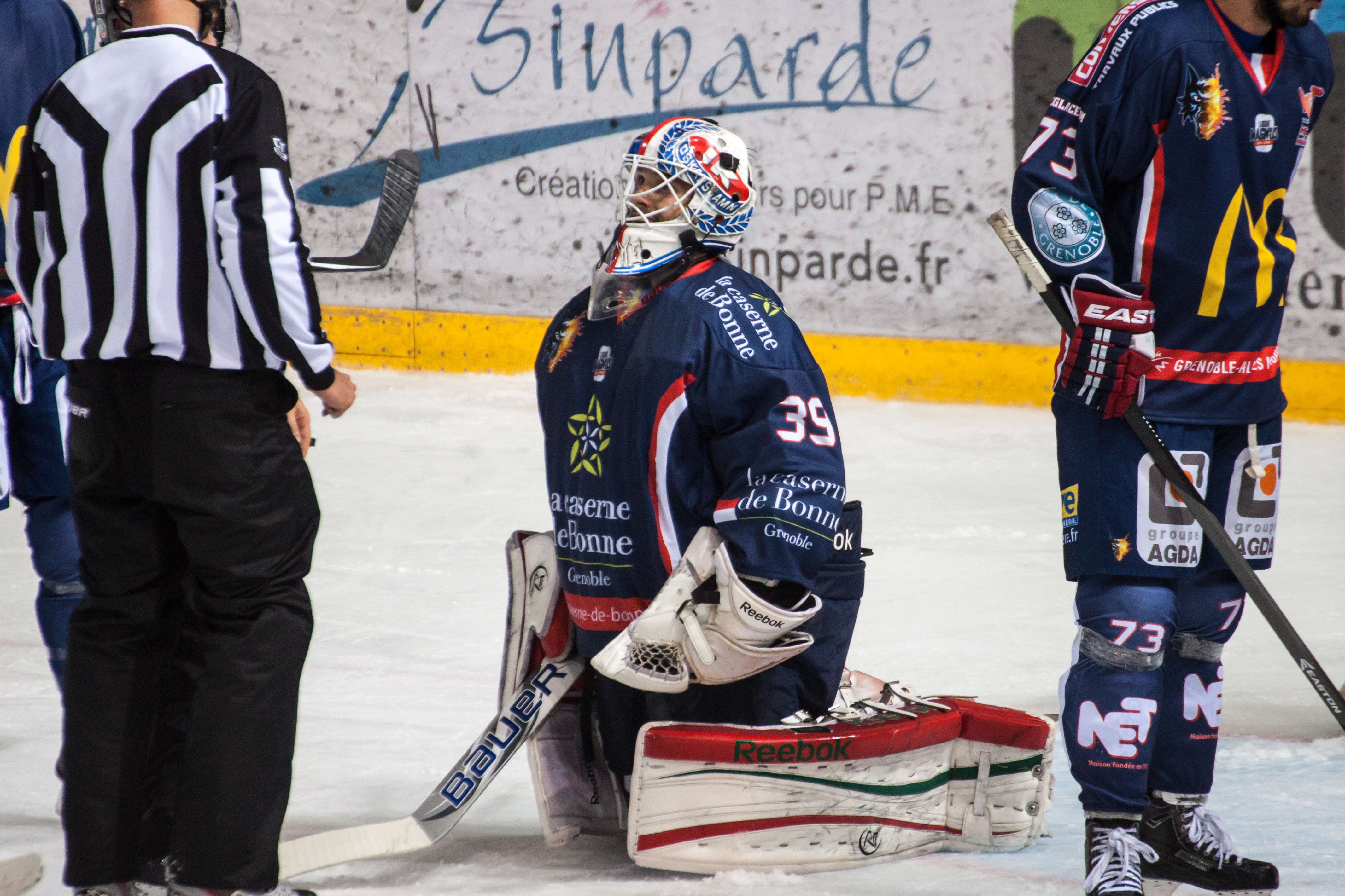 Michal Zajkowski lors du match Grenoble-Rouen le 24 octobre 2014 à la patinoire Polesud.